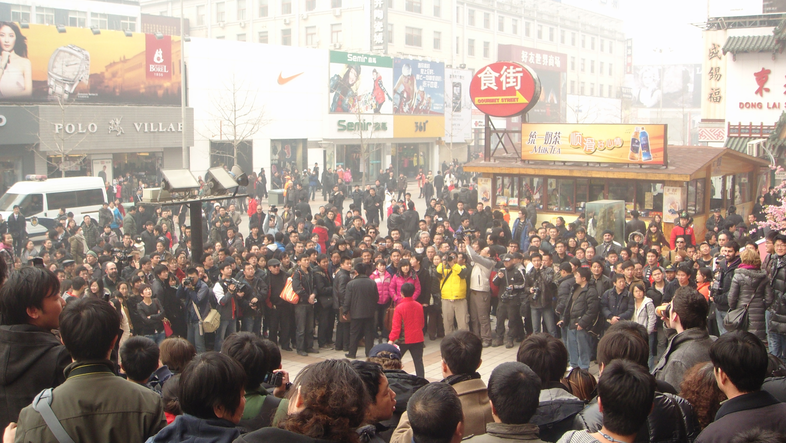 中国茉莉花革命